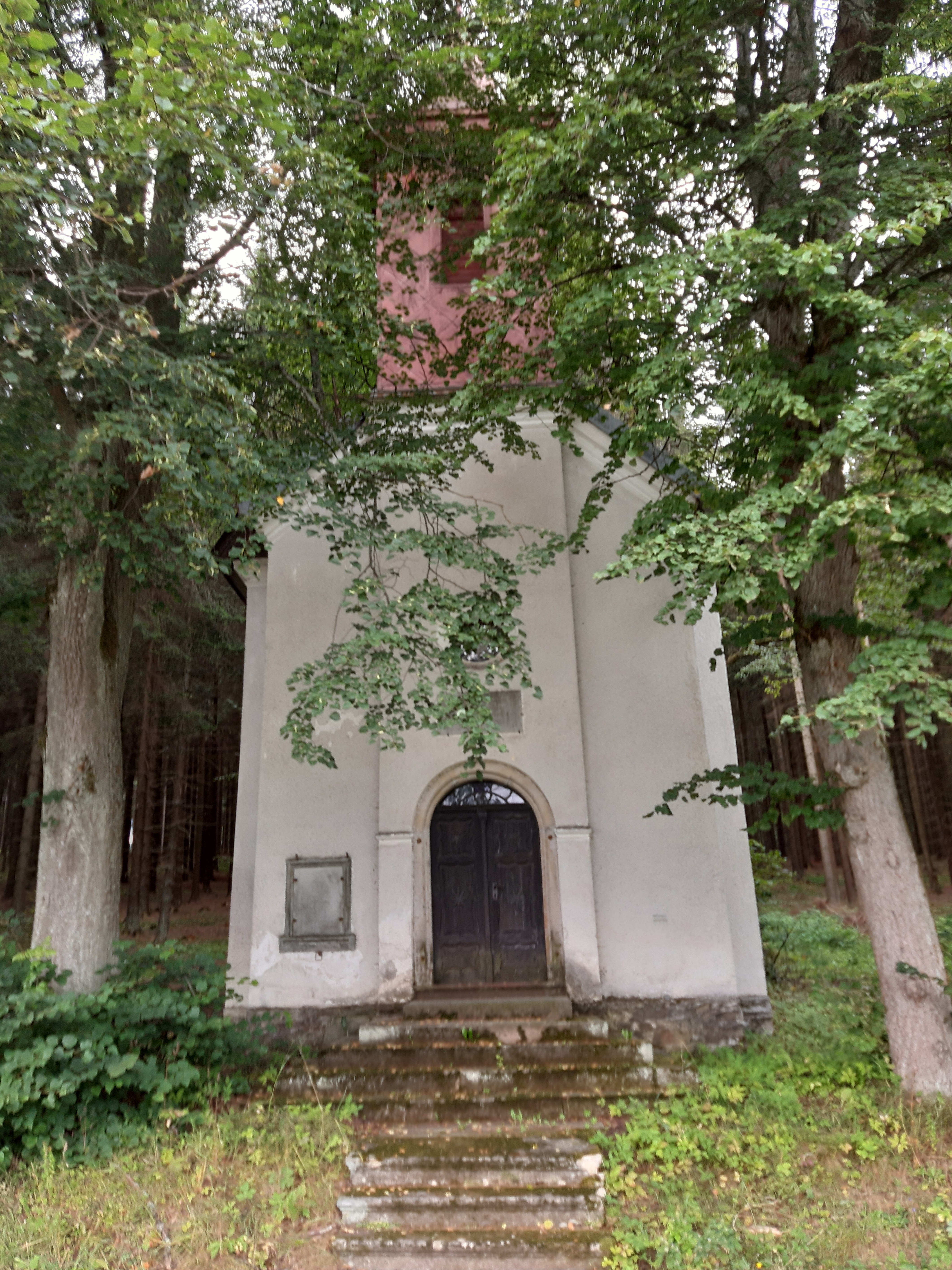 Kaple sv. Anny (Nová Ves v Orlických horách)